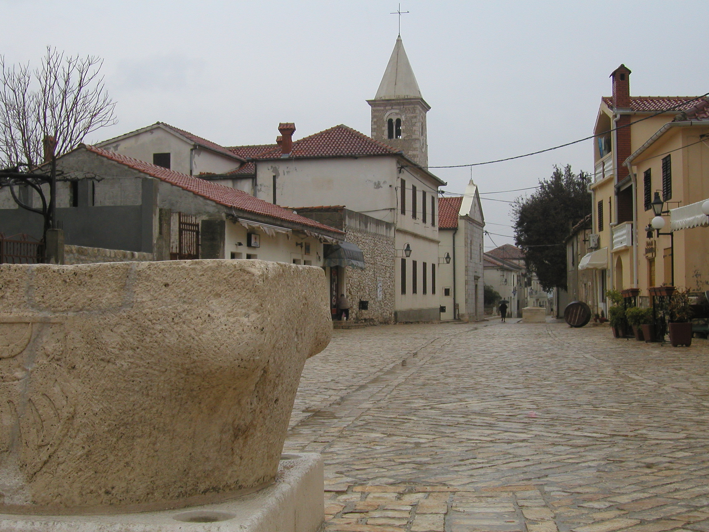 Nin